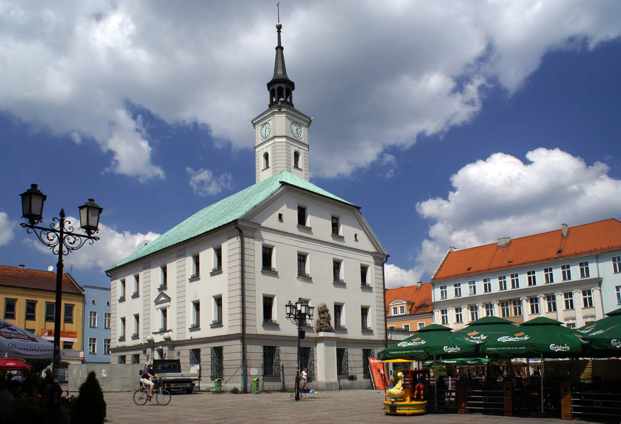 Gliwice, miasto - w ramach średniowiecznego założenia